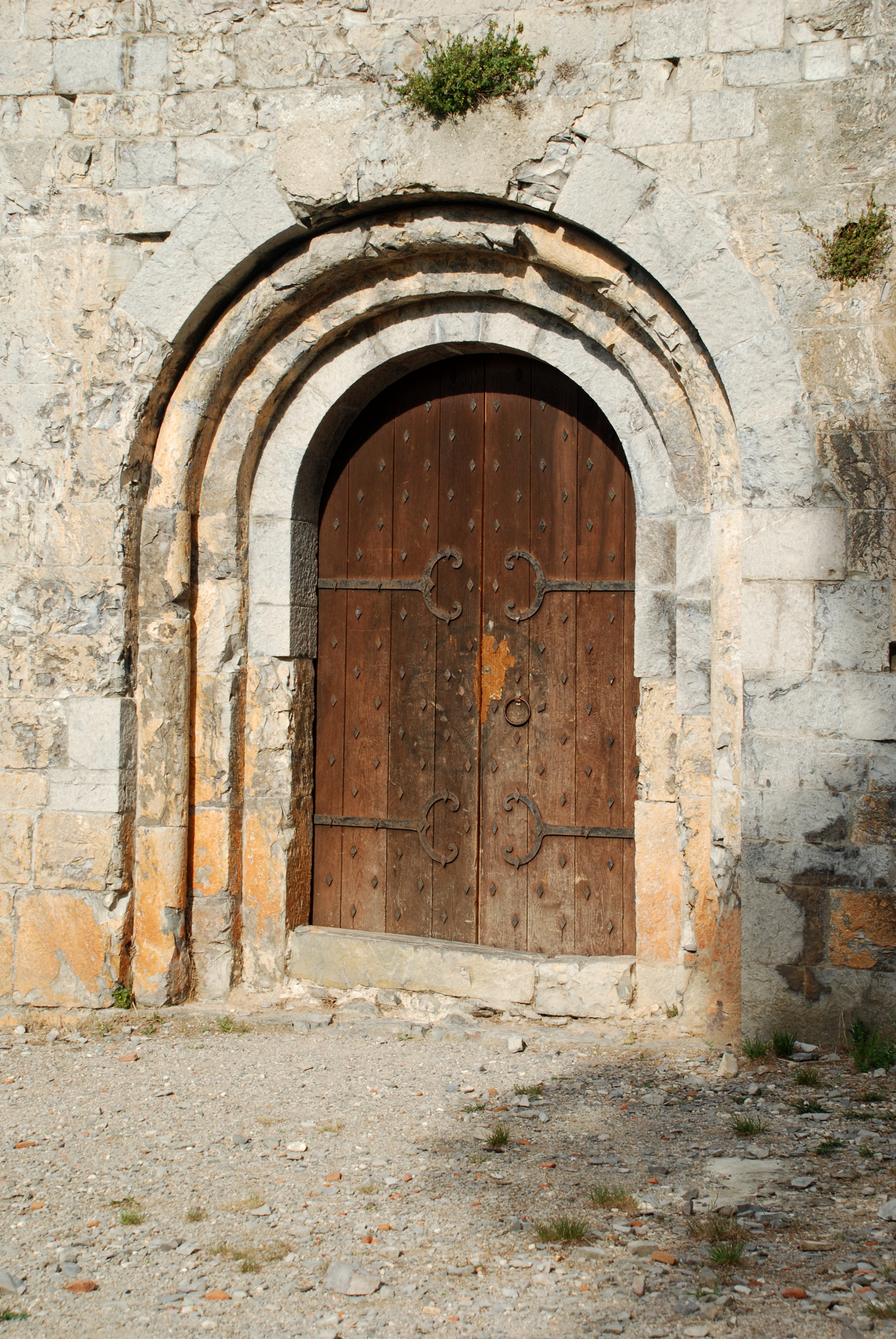 France - Hérault - Brissac - Chapelle Saint-Étienne d'Issensac